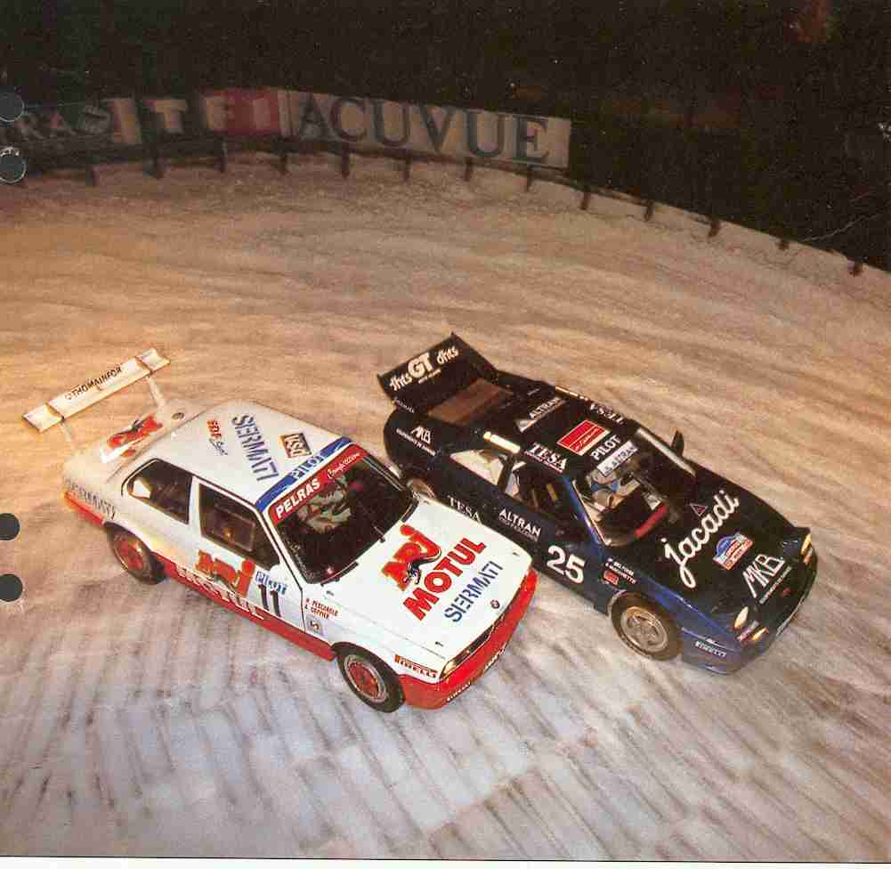 Je dépasse sans toucher JP Beltoise sur sa Venturi, avec une BMW du Team Pelras.